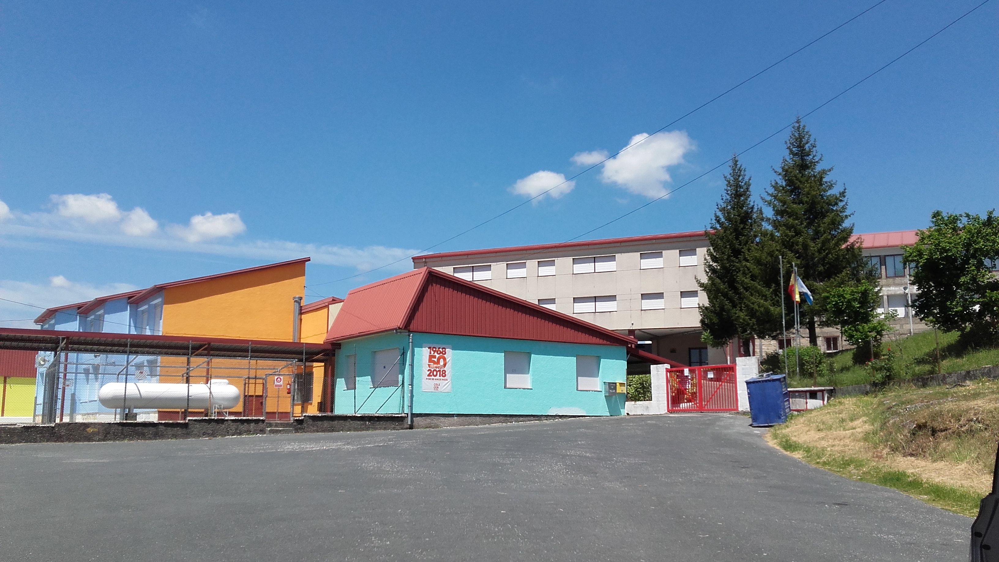 CPI Virxe da Saleta, San Cristovo de Cea, Ourense.